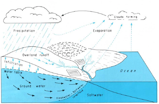 วัฏจักรน้ำ